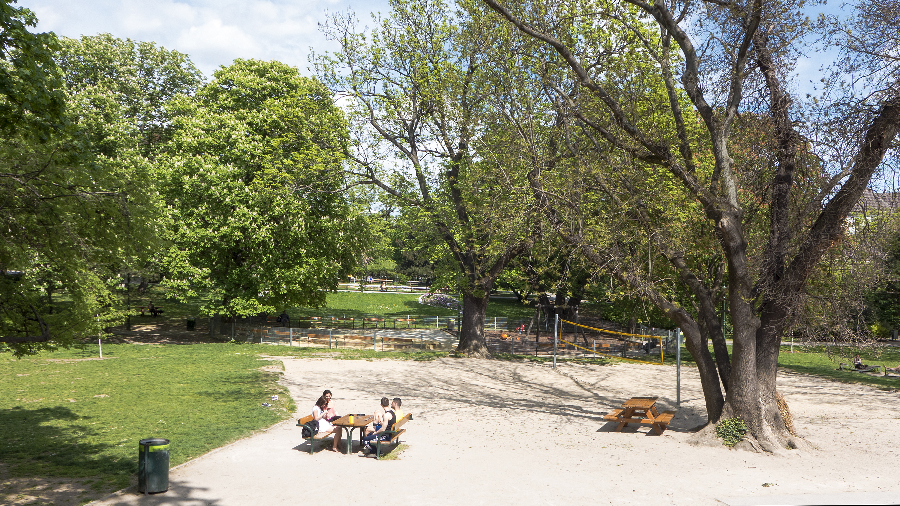 Waldmüllerpark in Wien 10